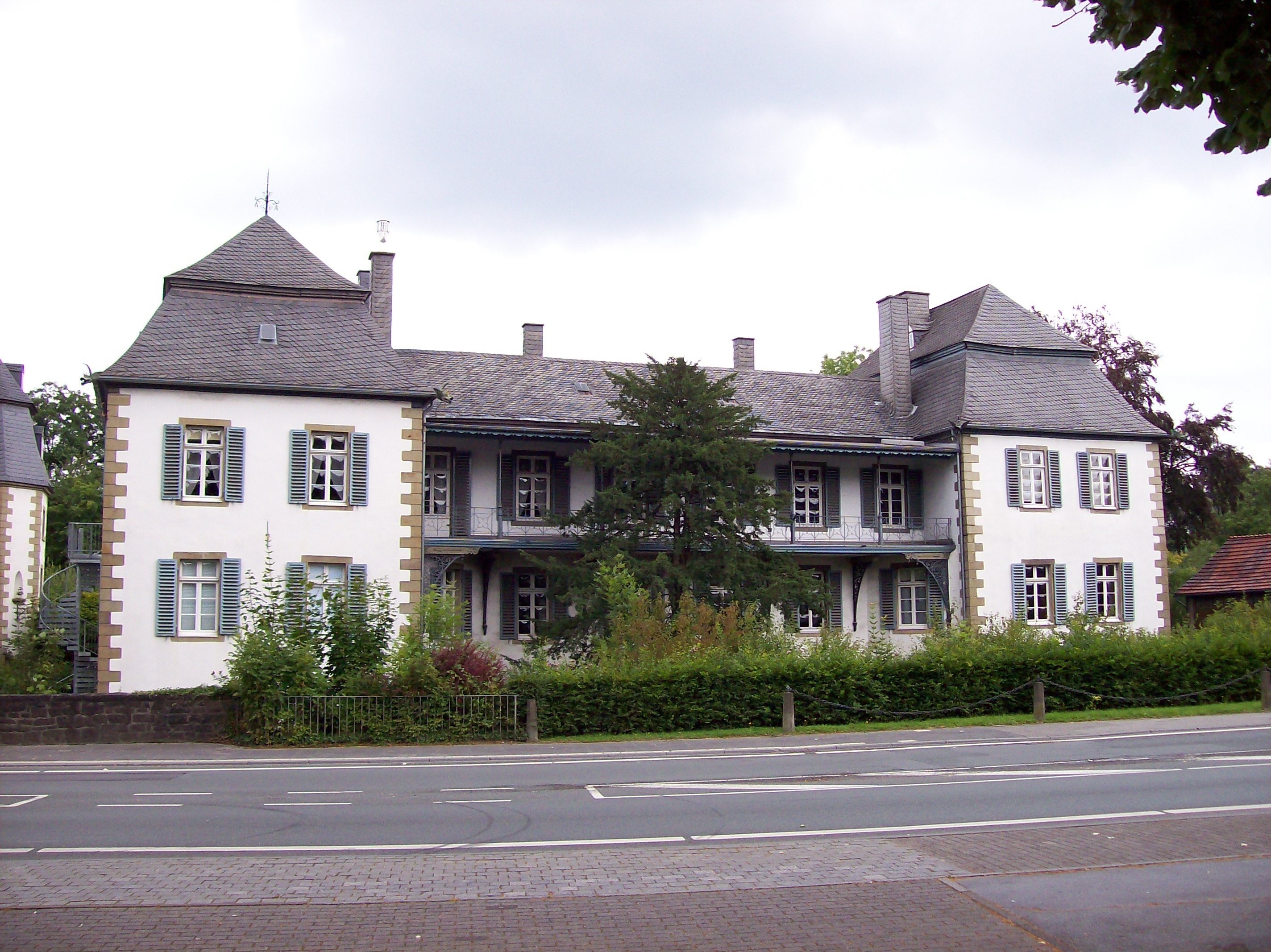 Haus Kupferhammer, Warstein (Germany)